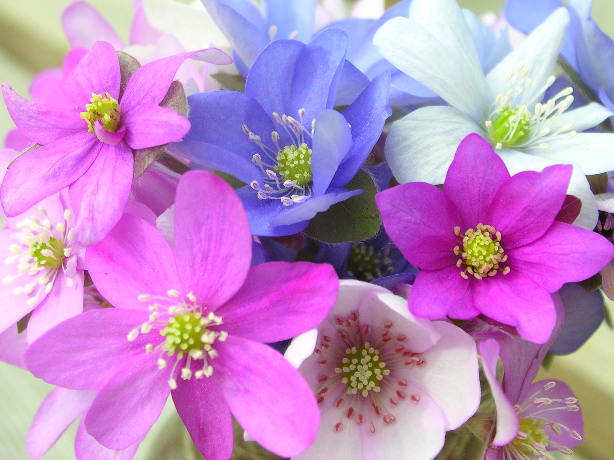 Blåveis i forskjellinge farger